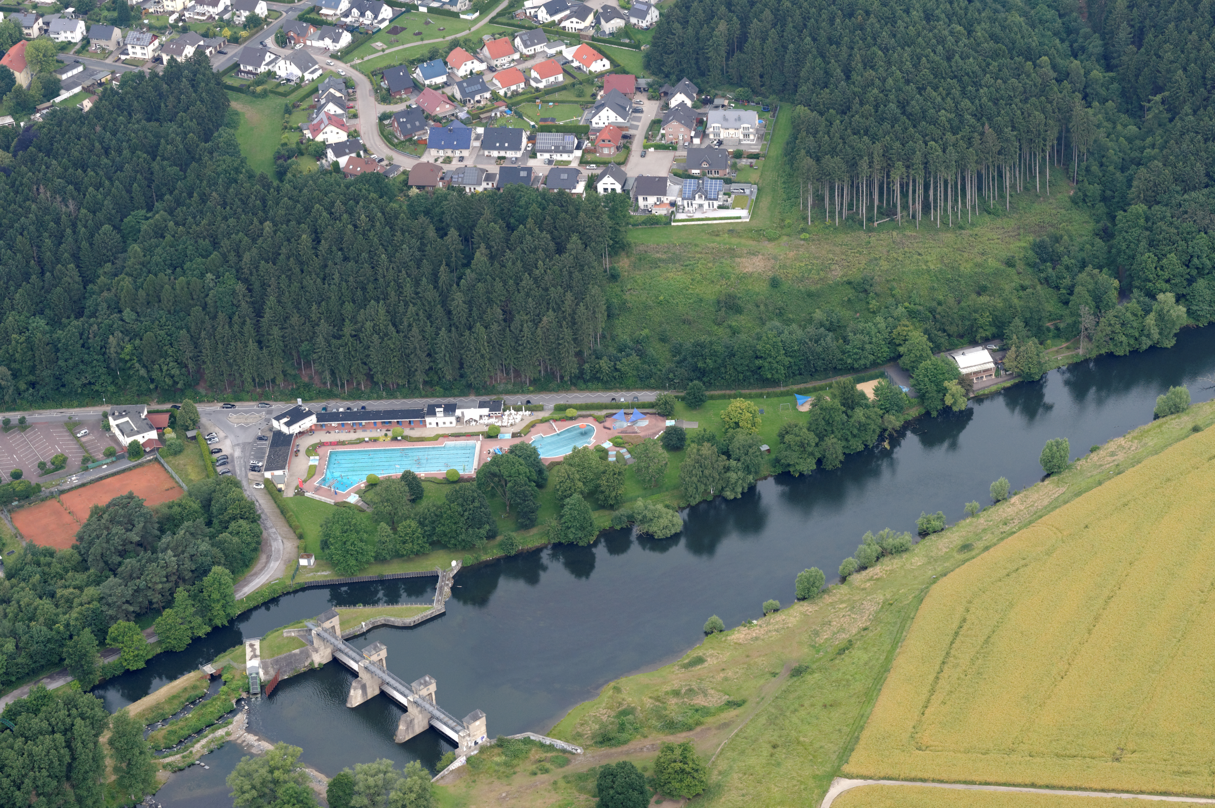 Fotoflug Sauerland Nord. Ruhr bei Wickede (Ruhr), Wickeder Freibad, Stauwerk, Blickrichtung Nord. The making of this document was supported by the Community-Budget of Wikimedia Germany.